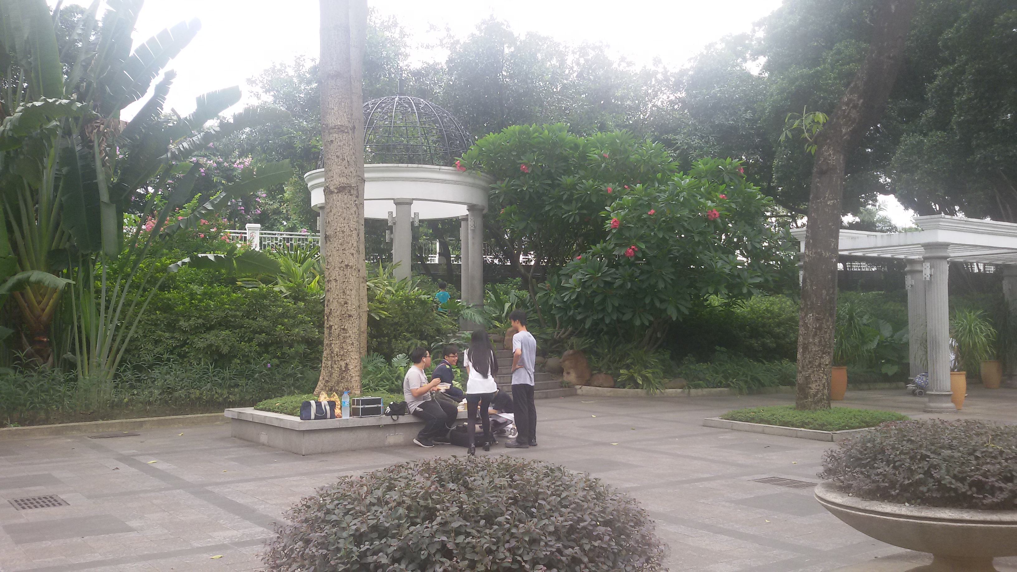 粵語: 广州嘅沙面公园